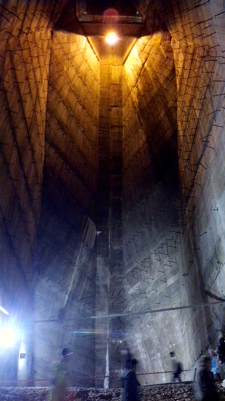 Dutá konstrukce přehrady Fláje